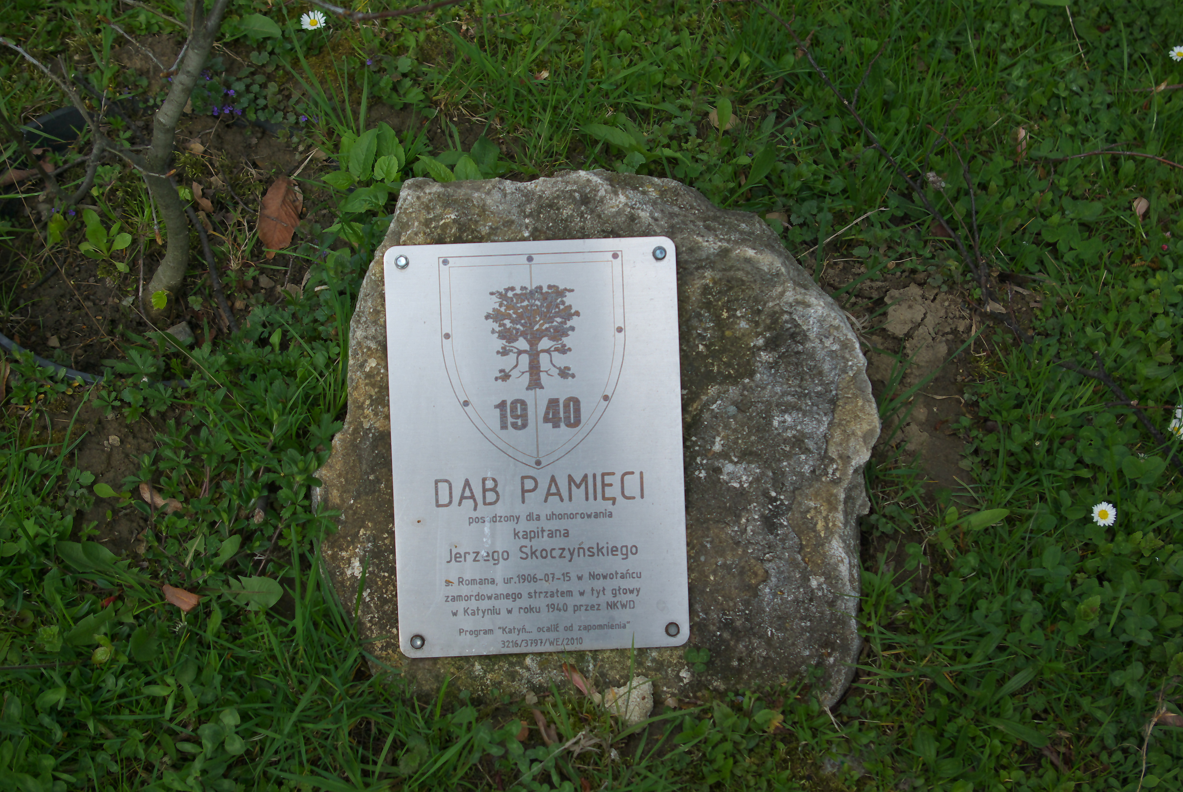 Dąb Pamięci honorujący Jerzego Skoczyńskiego w Pisarowcach